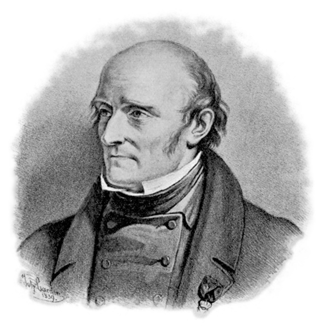 Porträt von Pehr Henrik Ling im Jahr seines Todes